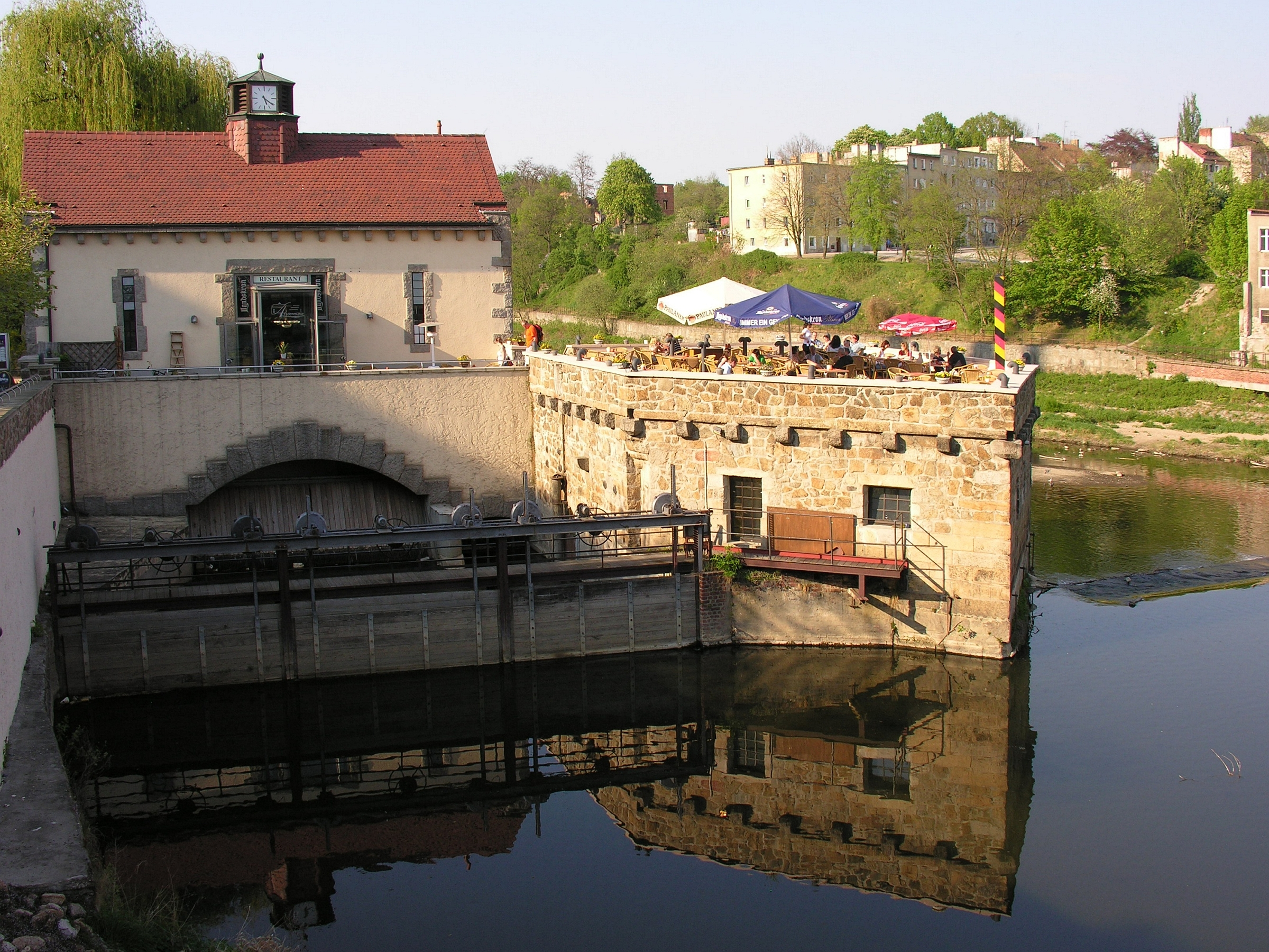 Görlitz Neiße Wehr Grenze zu Polen Vierradenmühle Sachsen Saxony Germany Foto 2007 Wolfgang Pehlemann Wiesbaden DSCN1231